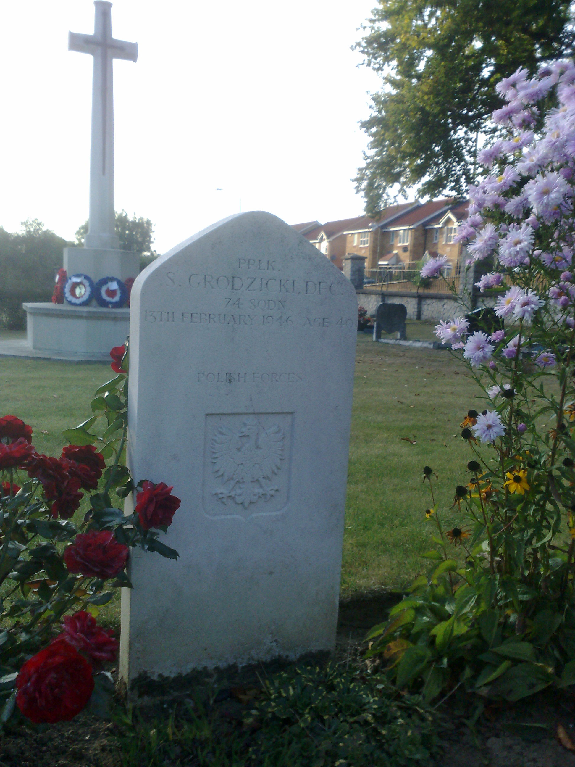 Grób Stanisława Grodzickiego na cmentarzu Star Lane Cemetery (Orpington, Kent, Wielka Brytania), znanym też jako St Mary Cray